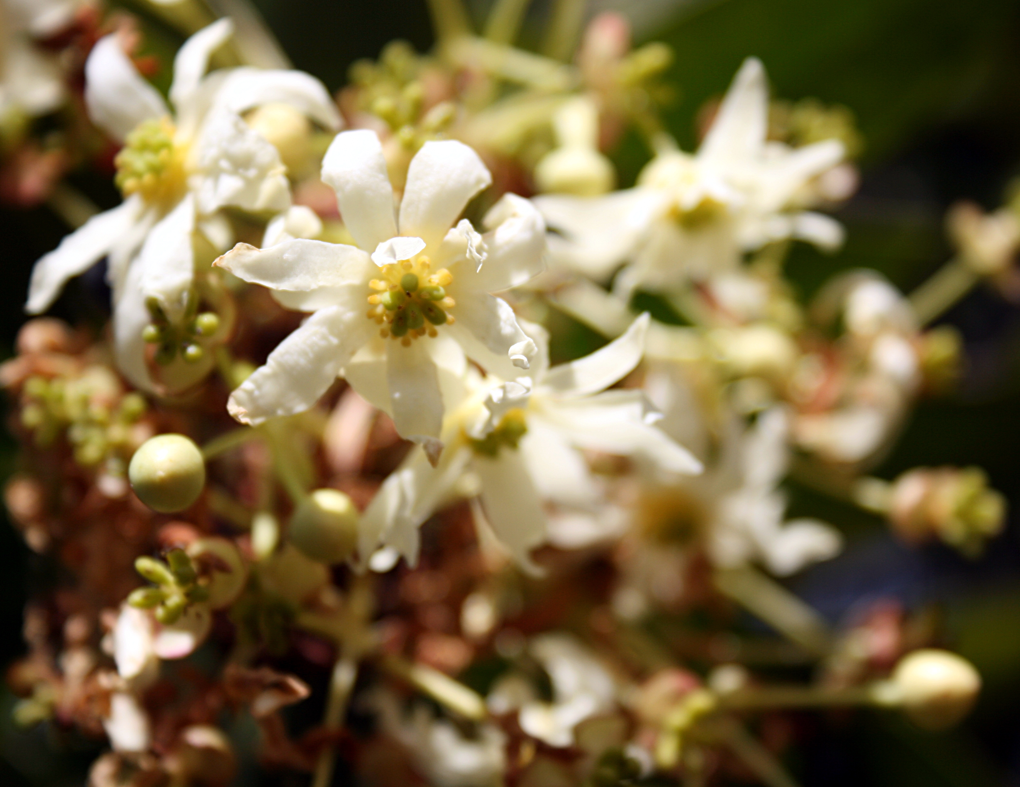 Madeira,_Palheiro_Gardens_-_Drimys_winteri_(Canelo, Südamerika)